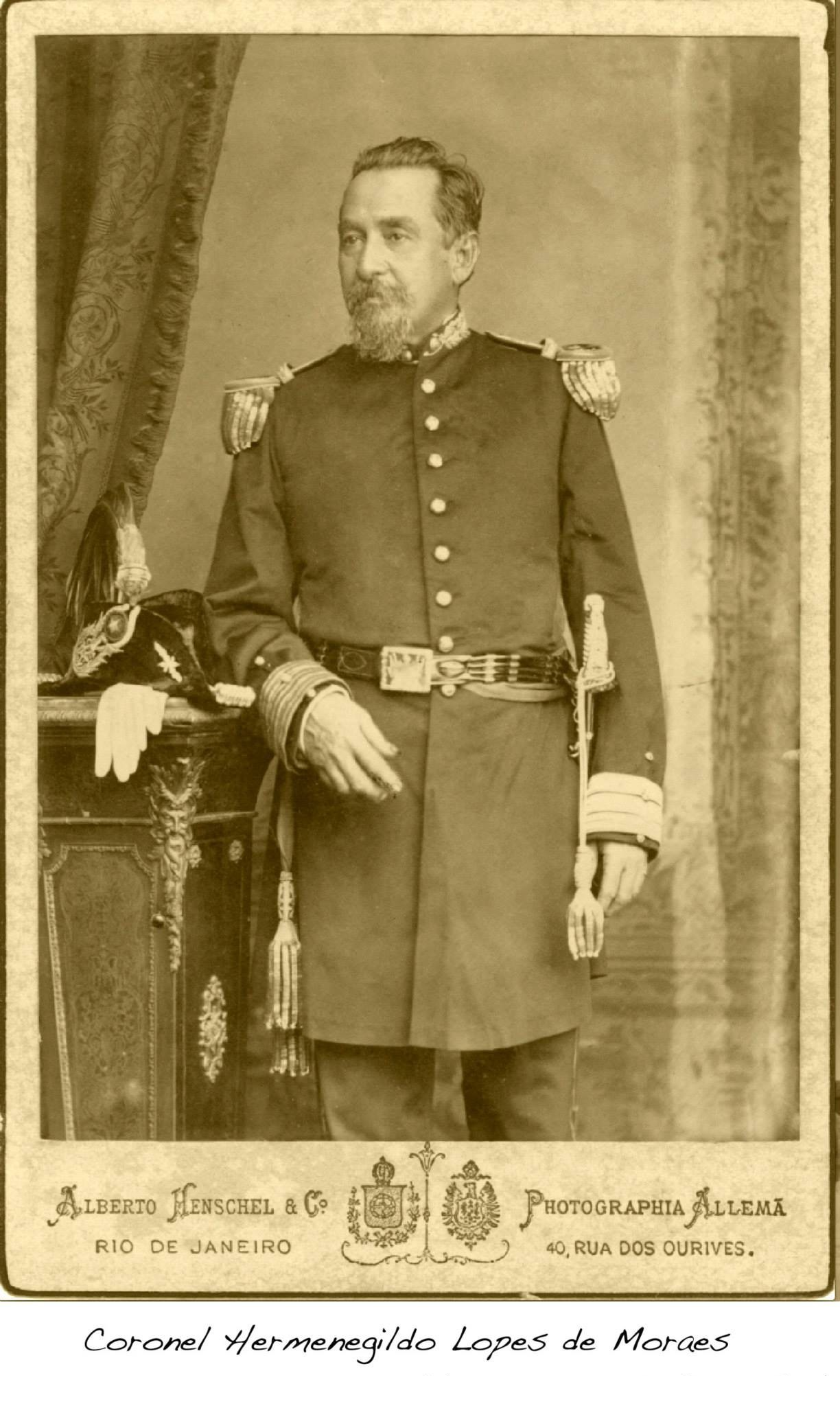 perfil